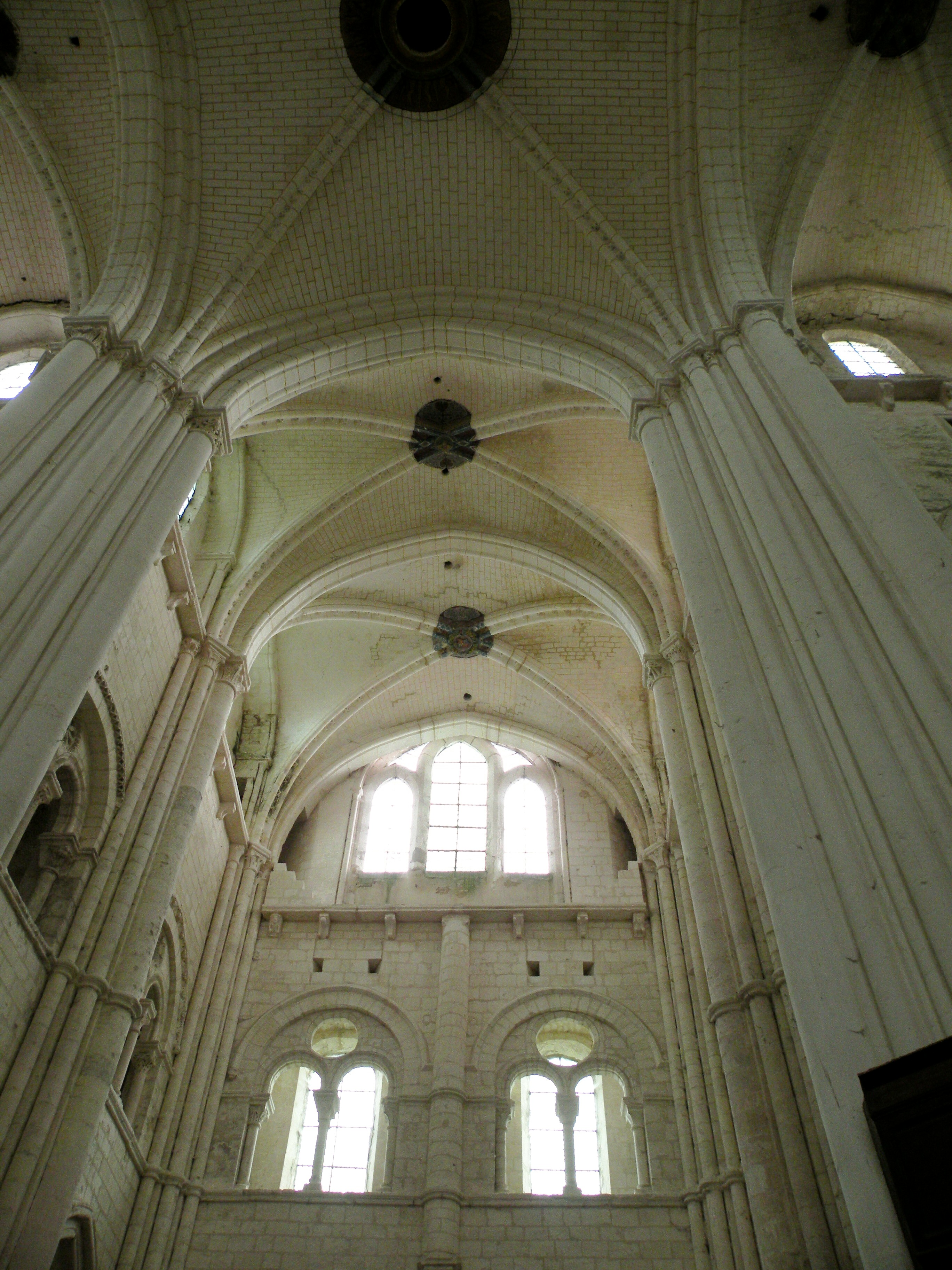 Abbaye Saint-Germer-de-Fly, intérieur de l'abbatiale : vue depuis le carré du transept dans le croisillon sud, resté inchangé.